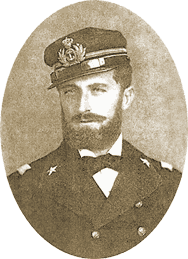 Giacomo Bove (1852-1887), Italian explorator